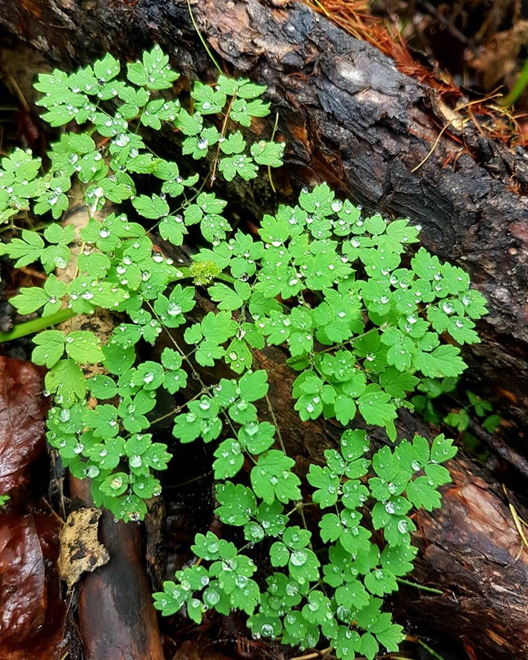 Morning dew in Siberia